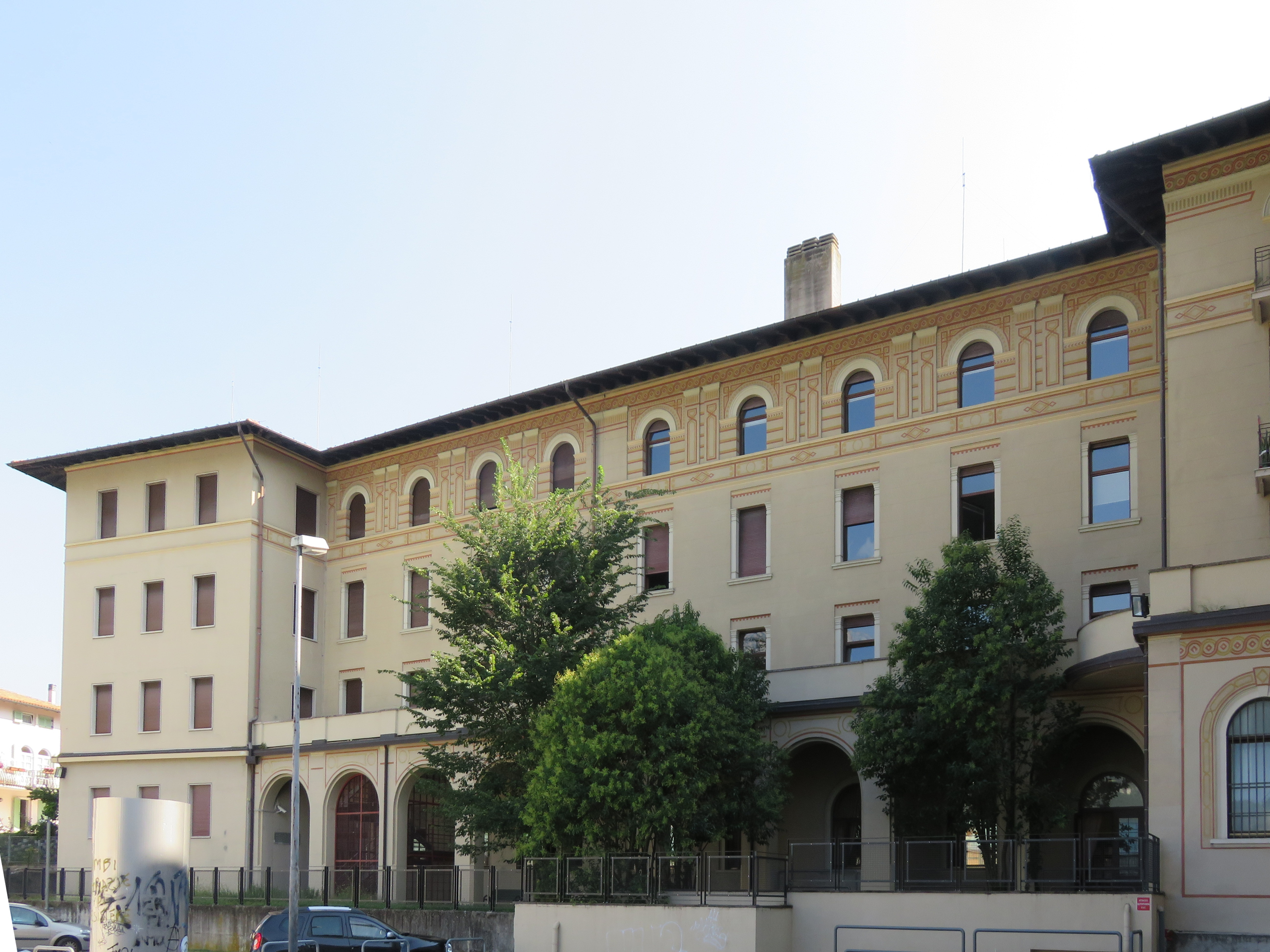 Liceo Antonio Rosmini di Rovereto - Facciata posteriore